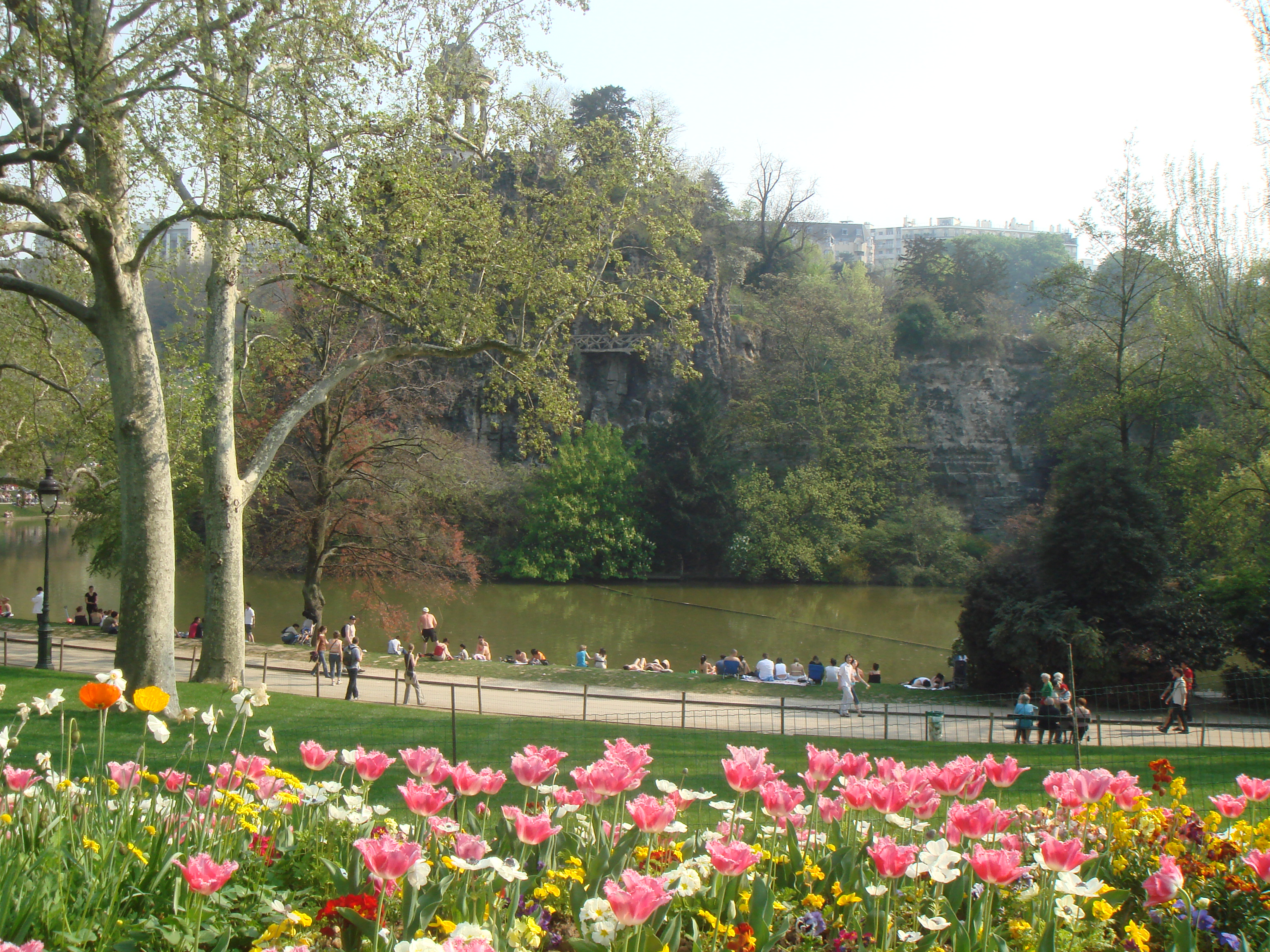 Park Buttes Chaumont, Paris